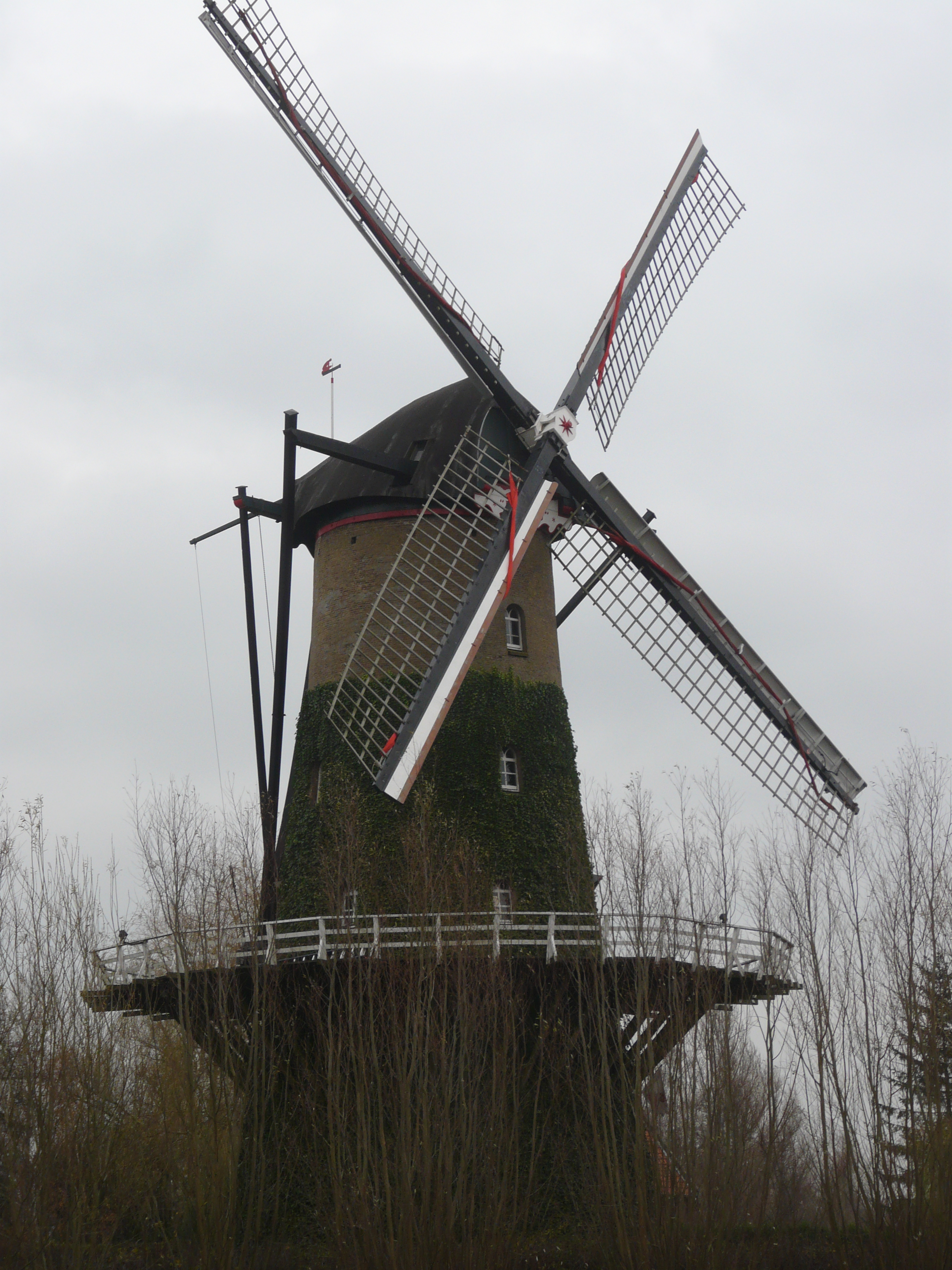 Molen de Arend in Terheijden, Noord-Brabant